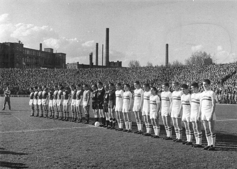 Zentralbild-MTI Tre-Hr 17.4.61 Großer Fußballtag in Budapest. Weltmeisterschaft - Ausscheidungsspiel DDR-Ungarn in Budapest 0:2. UBz. Die beiden Mannschaften vor dem Spiel.